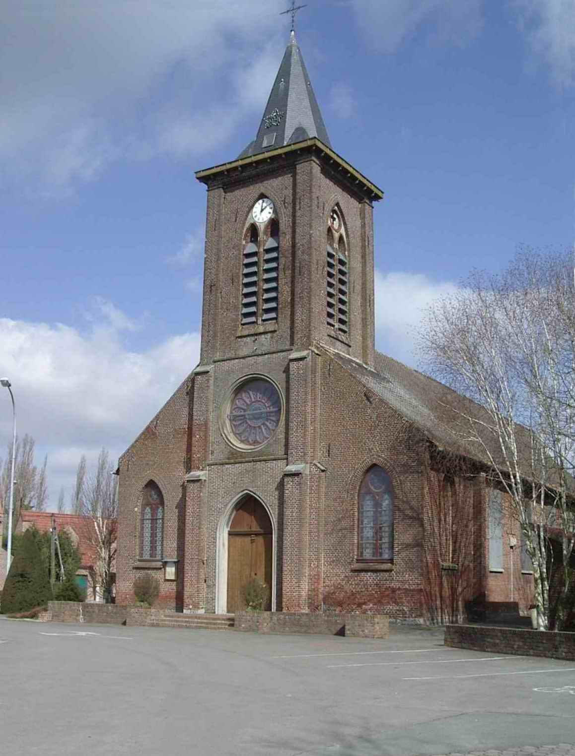 Eglise de bachy